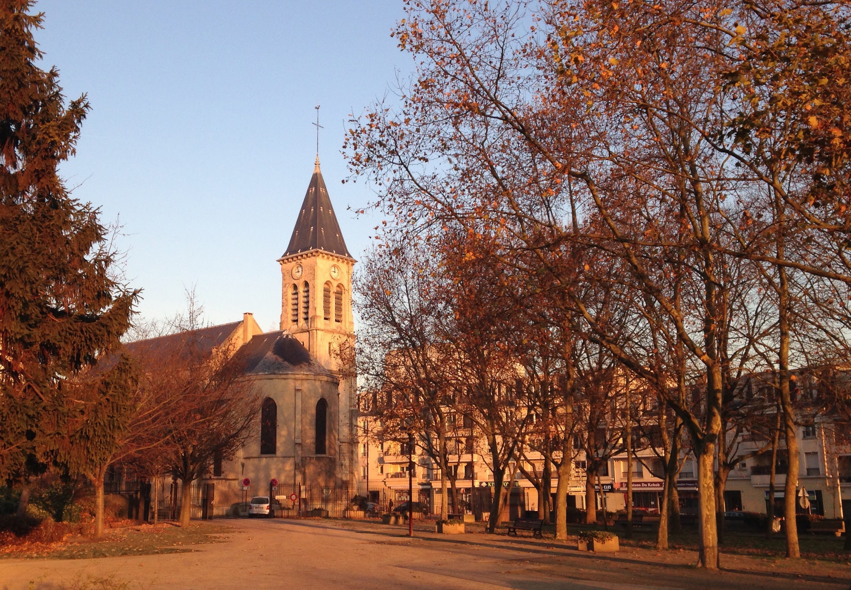 L'église de Bondy (93) vue depuis le square de l'Hôtel de Ville.